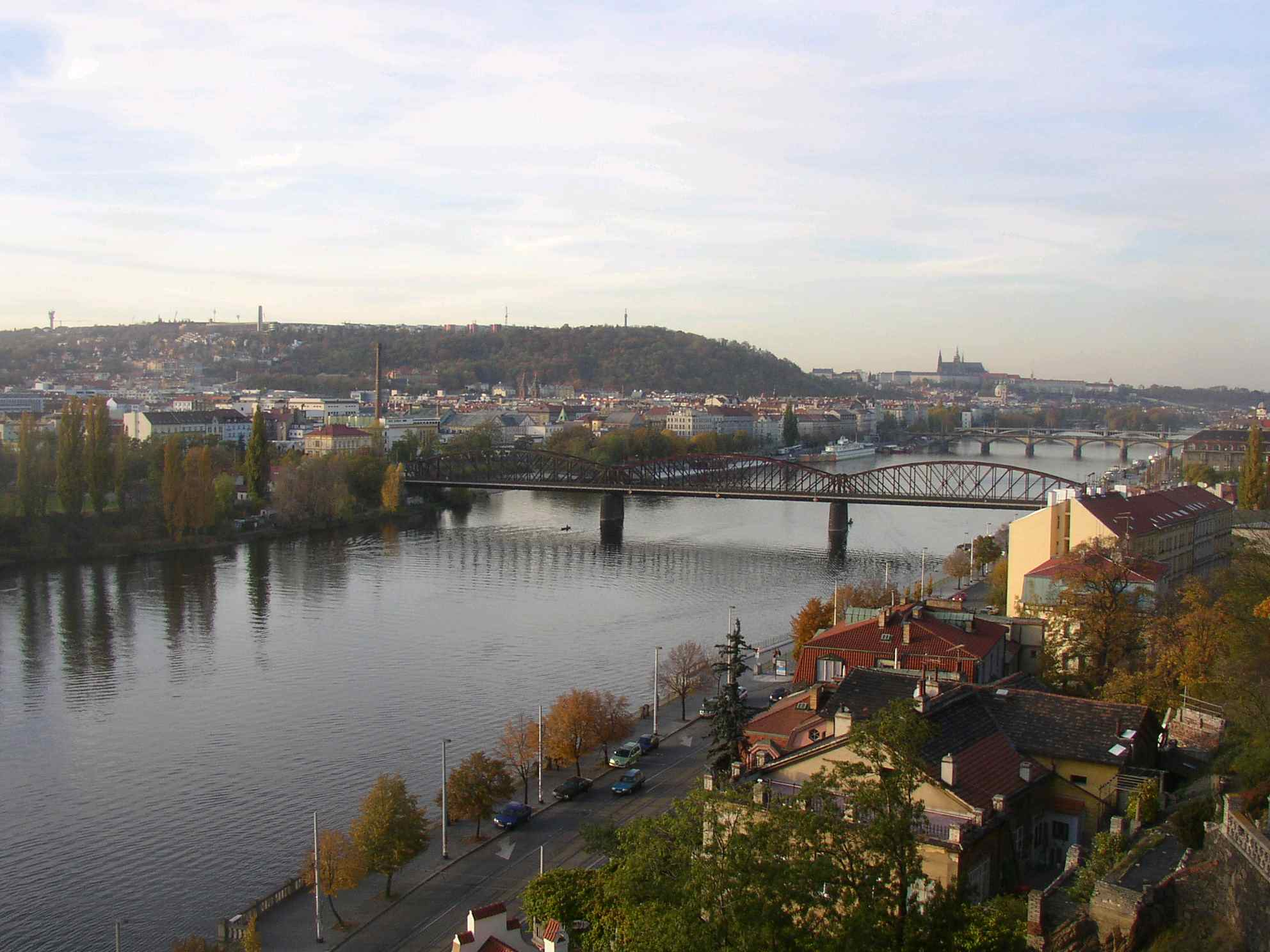 View from Vyšehrad over the Vltava River towards Prague Castle in Prague, Czech Republic The air distance between these two castles is slightly above 3 km. Smíchov district occupies left and central part of the image behind the river. Strahov-Petřín hill is also visible. Pohled s Vyšehradu přes Vltavu směrem ku Pražskému hradu, vzdálenému vzdušnou čarou něco přes 3 km. Vidět jsou Železniční most pod Vyšehradem, Palackého most a nejvzdálenější Jiráskův most. Levou a střední část snímku zaujímá na protějším břehu řeky Smíchov, v pozadí je dobře patrné i strahovsko-petřínské návrší. Photo taken by Miaow Miaow in October 2005, PD-self